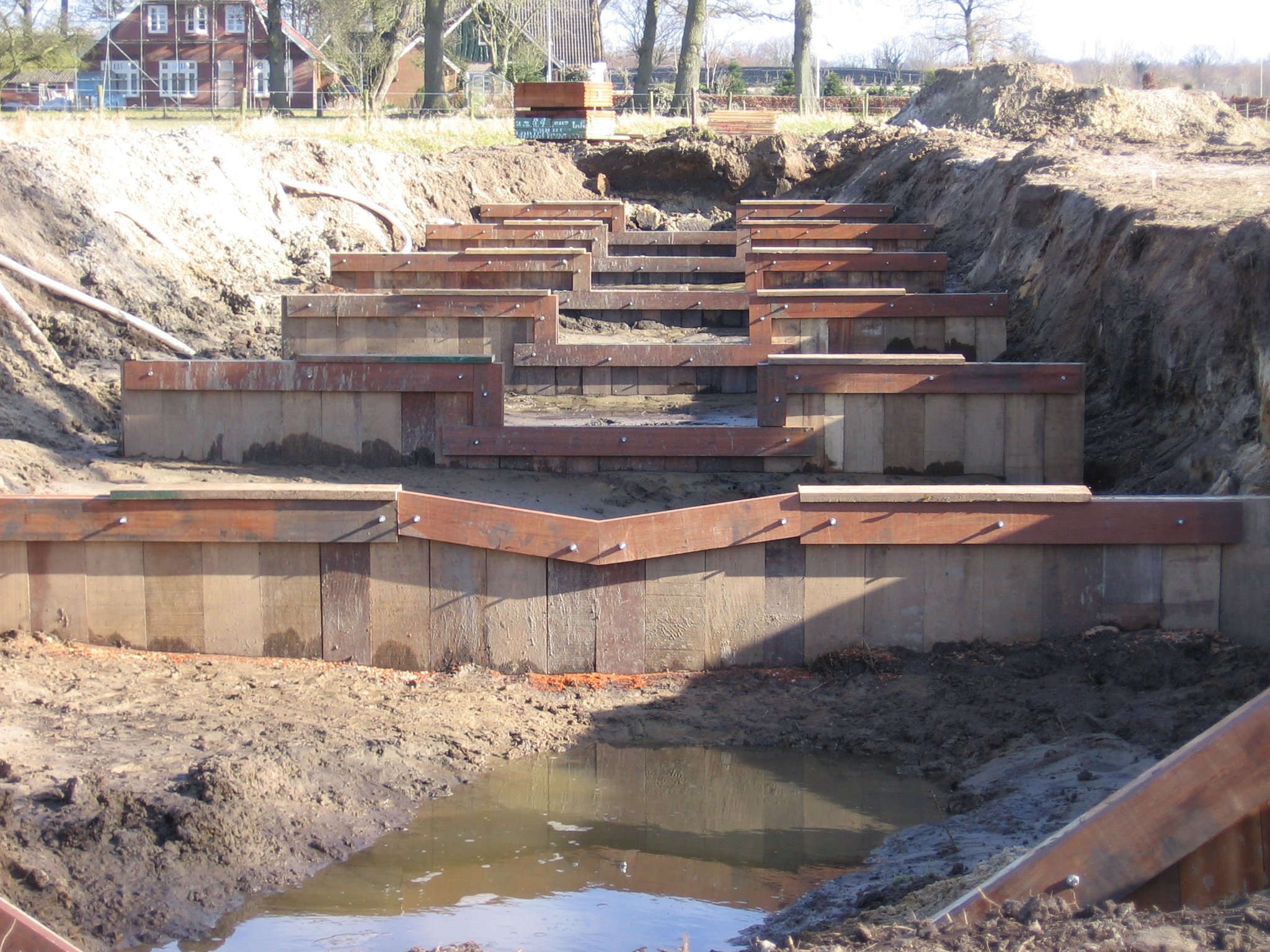 Deze foto heb ik zelf genomen op 20 maart 2006 omgeving Saasveld.